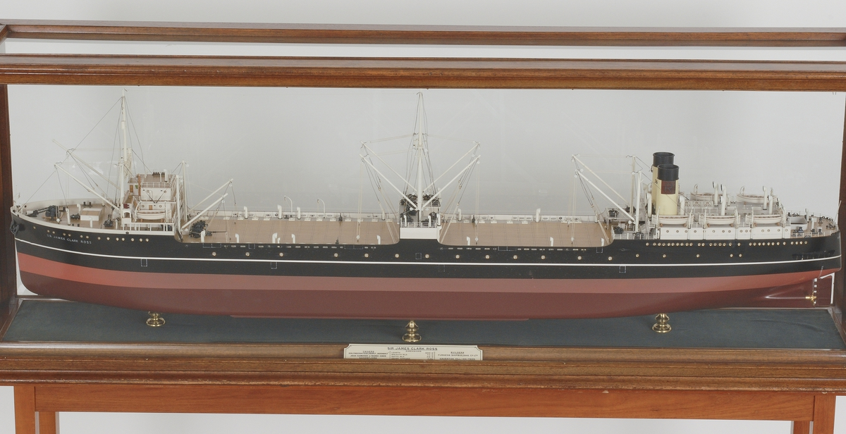 Modell av det flytende hvalkokeriet Sir James Clark Ross